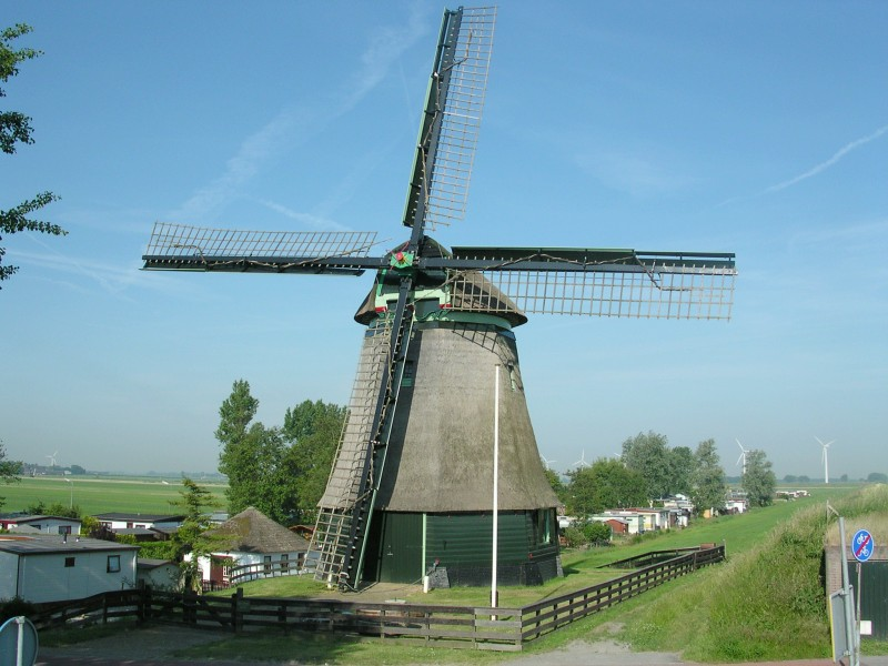 De molen De Hoop" in Wieringerwaard, voor de storm van januari 2007. The mill De Hoop" in Wieringerwaard, before the storm of January, 2007.